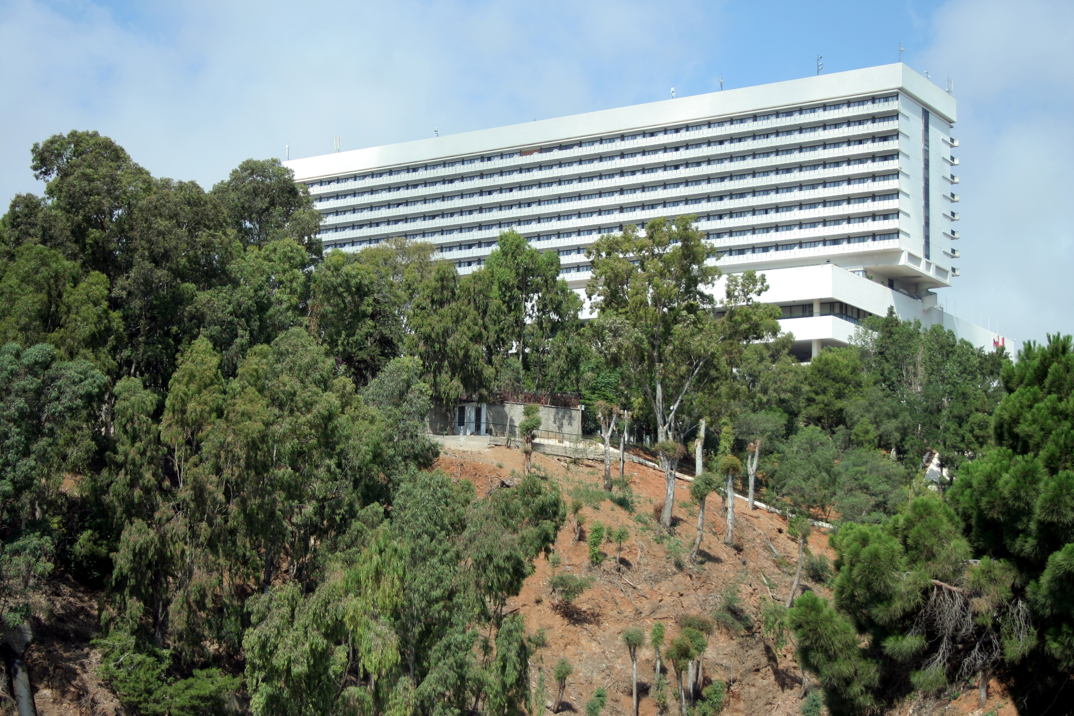 Alger (Algérie), l'Hôtel El Aurassi, vue de la rue Frantz Fanon (ex-rue De Lattre de Tassigny).